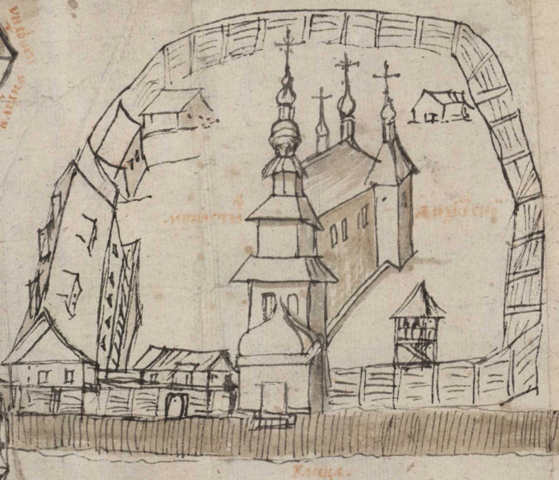 Беларуская (тарашкевіца): Віцебск (Viciebsk). Касьцёл Сьвятога Язэпа і кляштар езуітаў па пераробцы пад манастыр Маскоўскай царквы